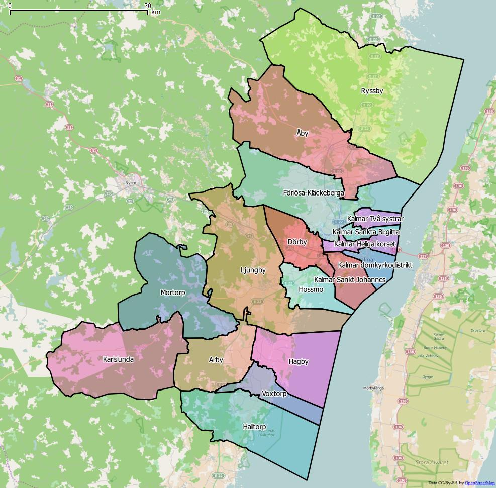 Distriktsindelningen i Kalmar kommun World file: 109.12809585785085176 0 0 -109.12809585785085176 1742369.50596547243185341 7747846.7983693815767765